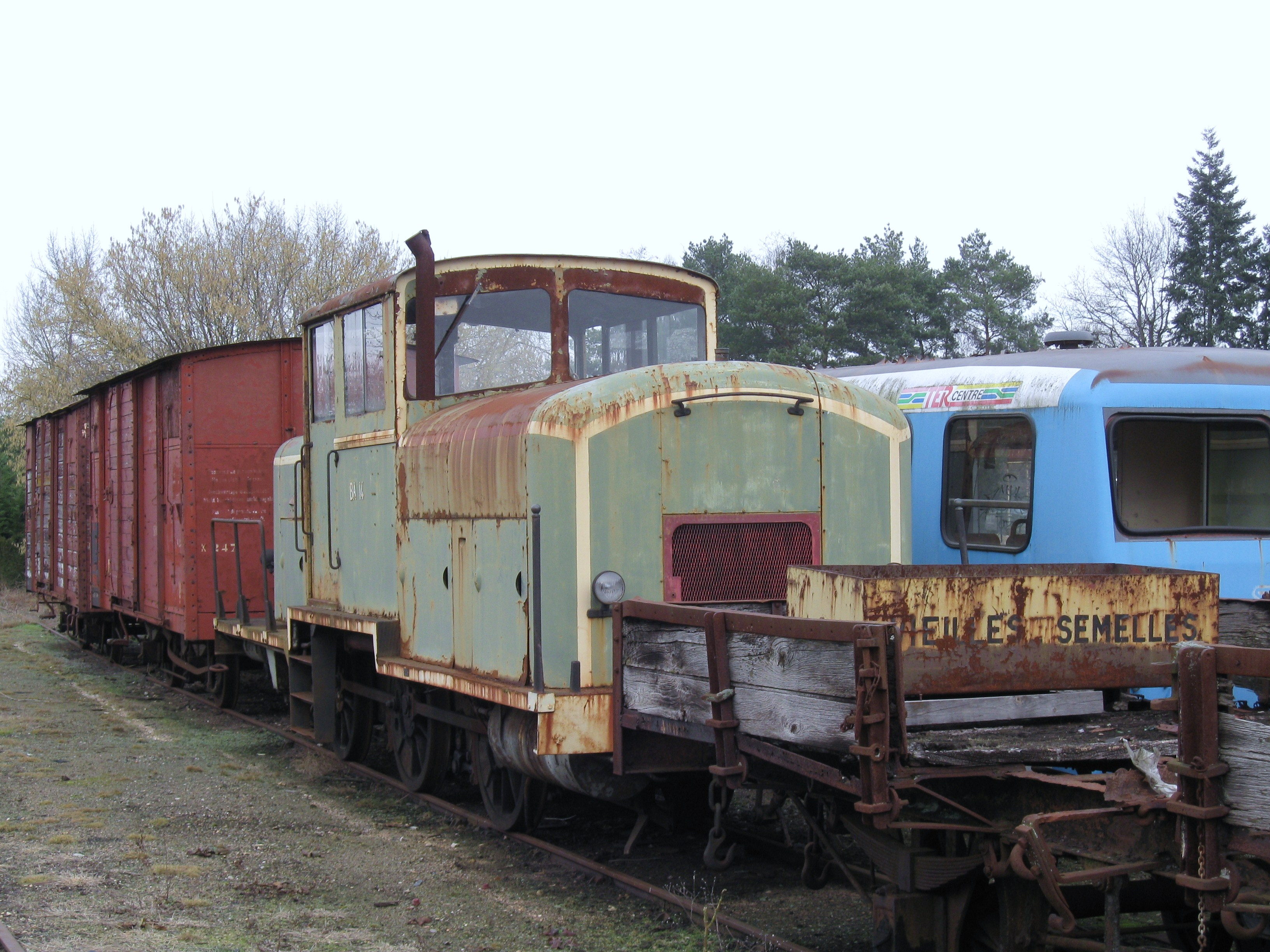 Ancien locotracteur diesel (BA 14) sur une voie de garage en gare de Romorantin-Blanc-Argent (chemin de fer à voie métrique du Blanc-Argent), Romorantin-Lanthenay, Loir-et-Cher, France